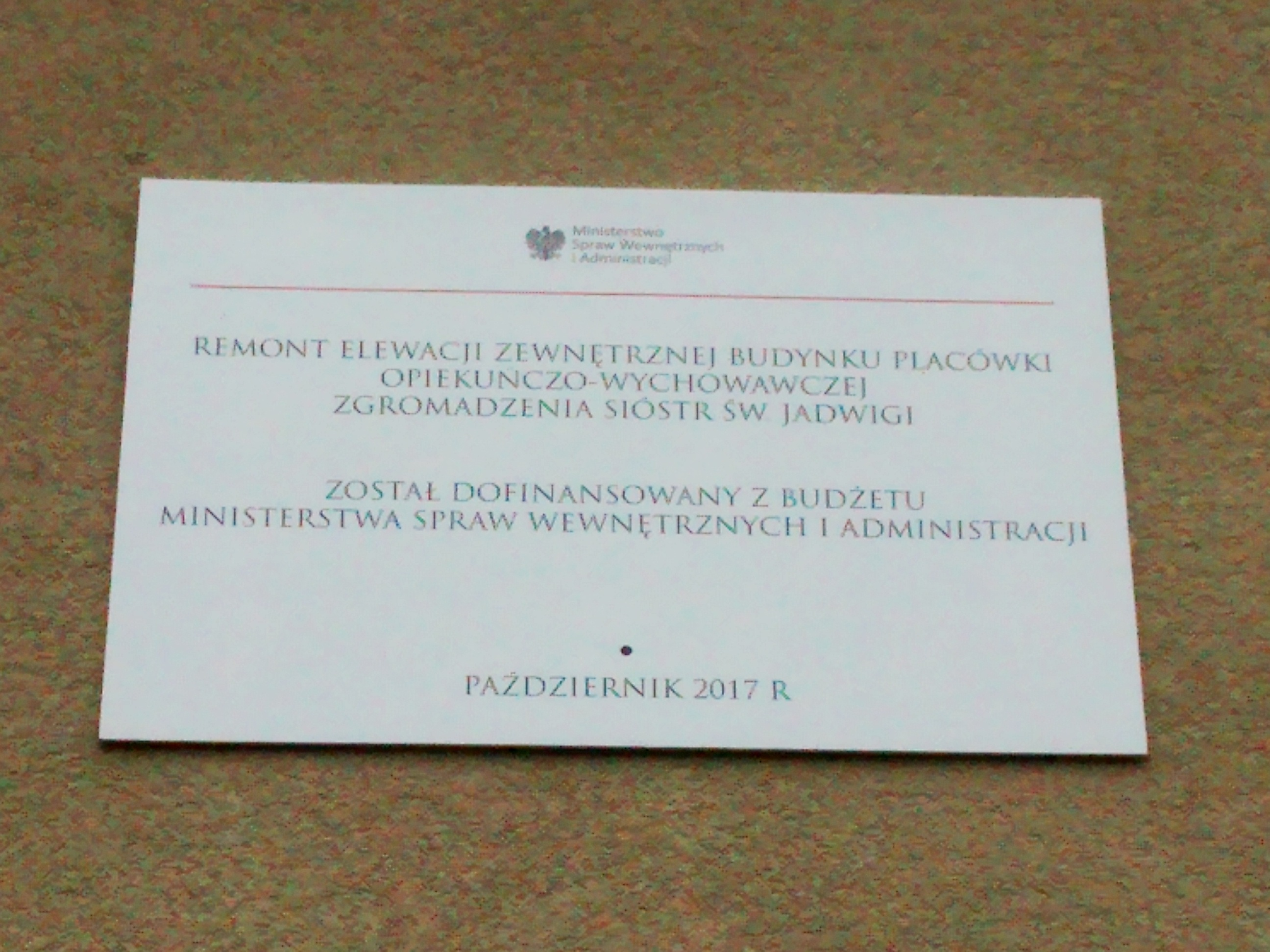 Tablica na budynku przy ul. Strzelców Bytomskich 1 w Katowicach